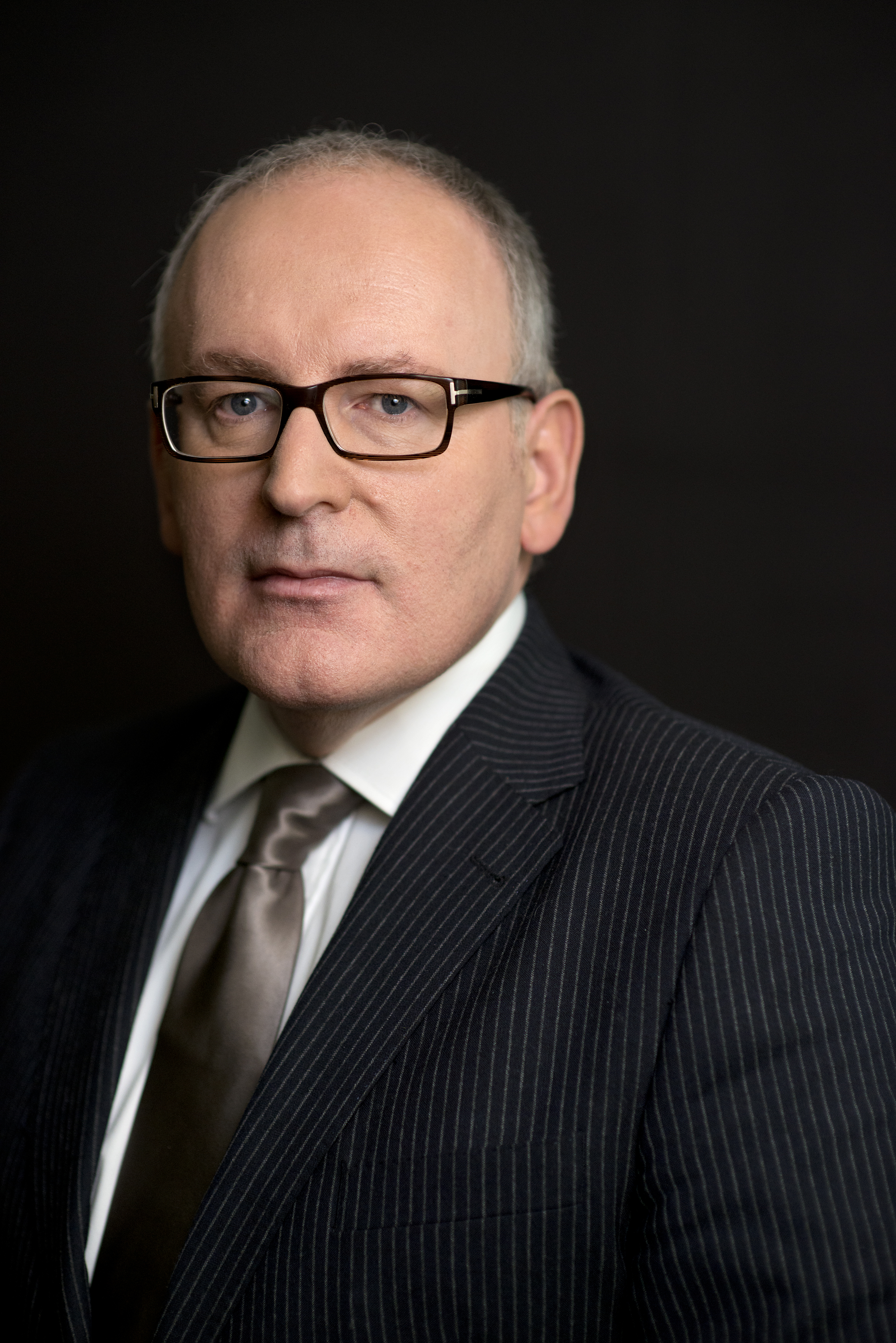 Timmermans2